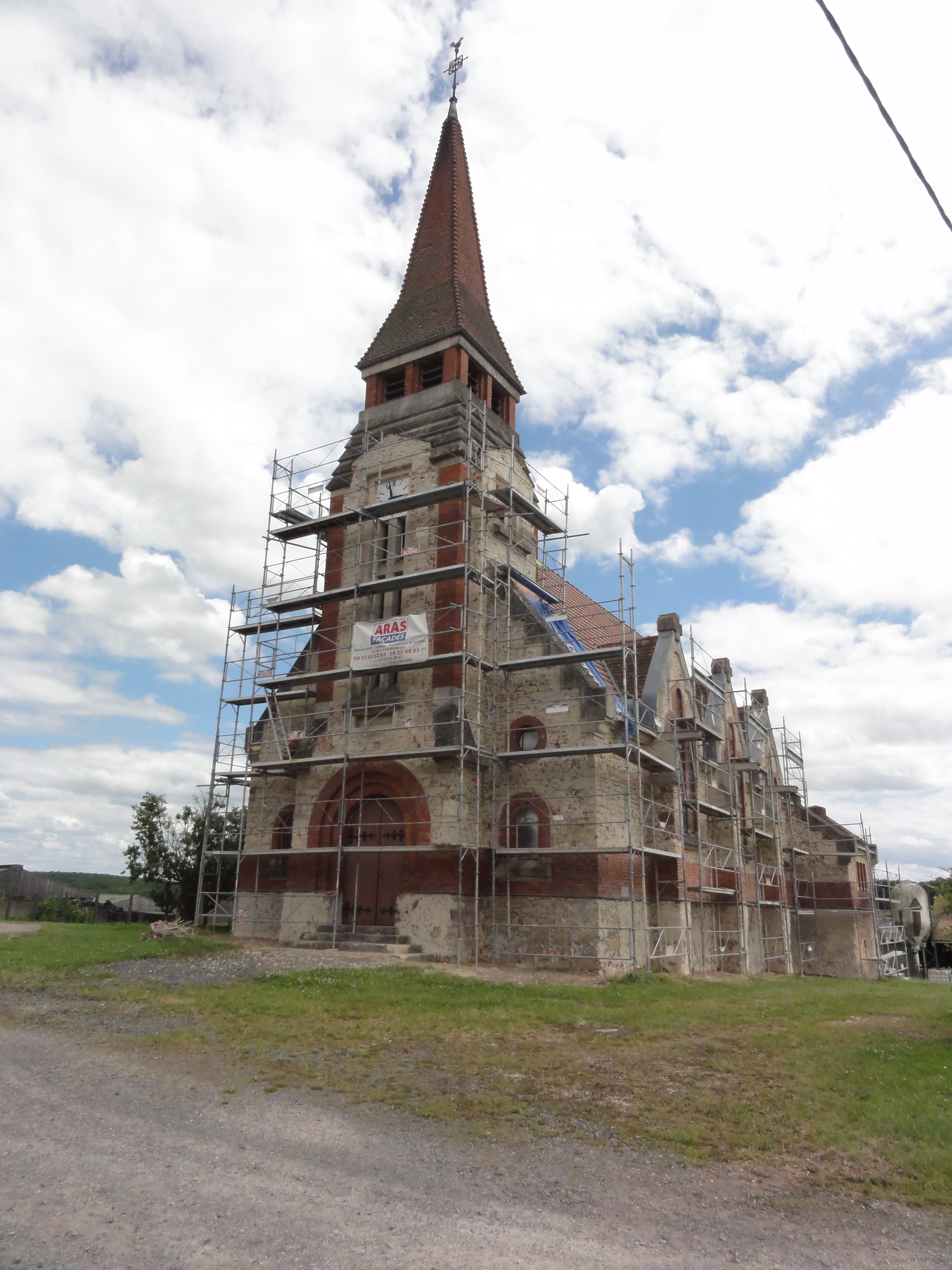 Gondrexon (M-et-M) église en restauration 2016